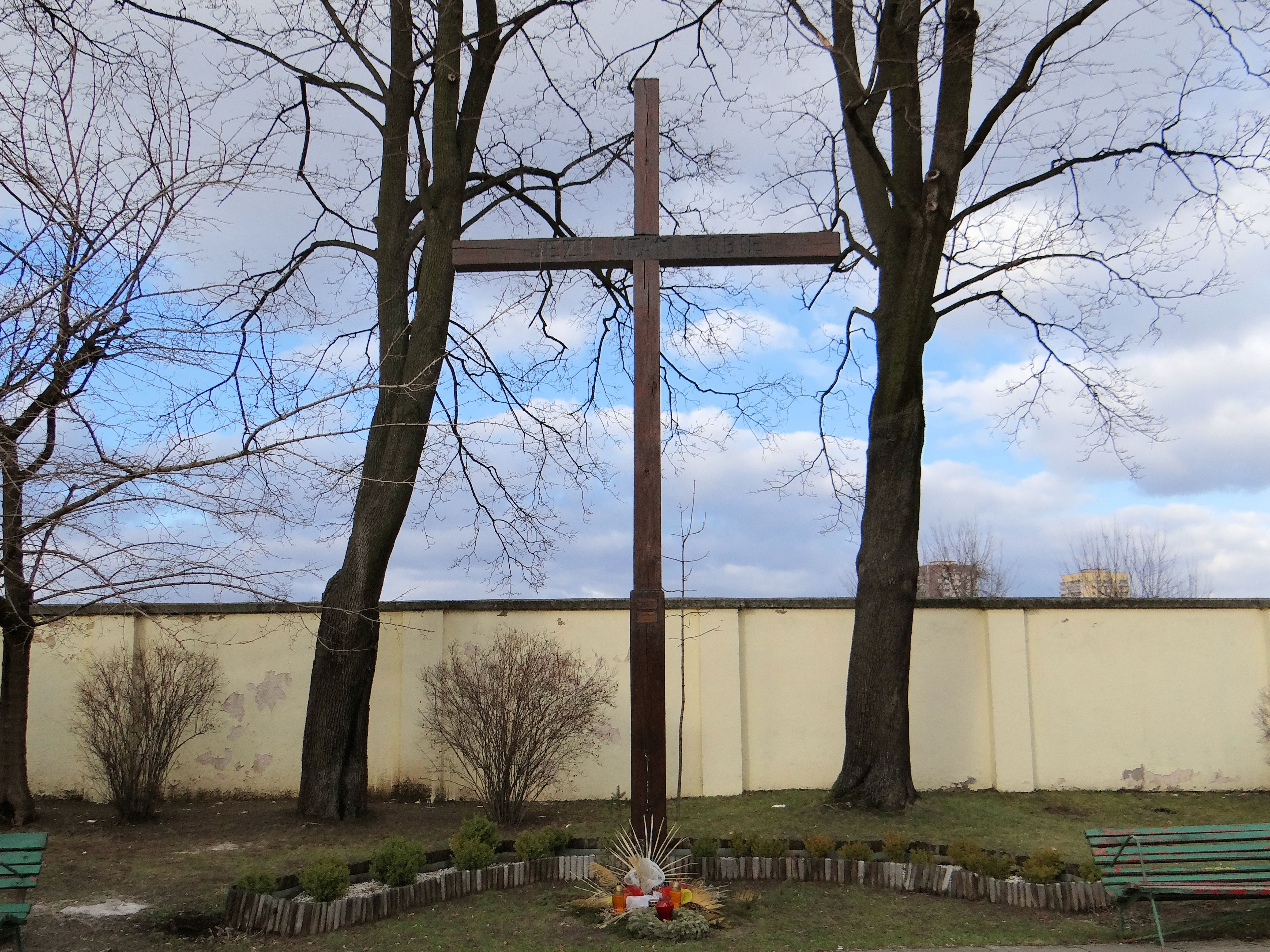 Kościół Matki Bożej Królowej Polski Zgromaczenia Księzy Marianów na Żoliborzu przy ul Gdańskiej 6A w Warszawie - krzyż misyjny na dziedzińcu światyni